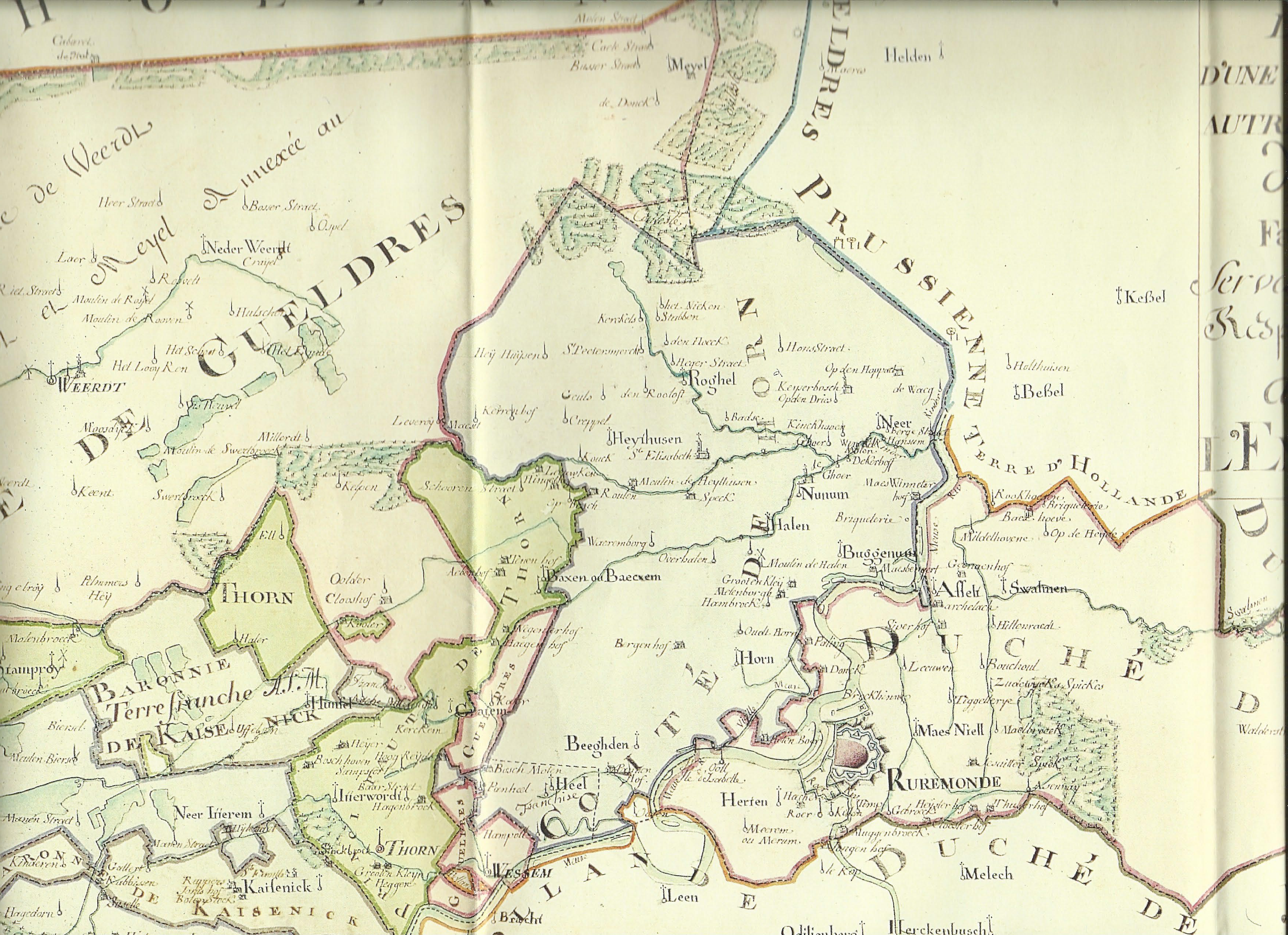 Een gereviseerde Ferrariskaart van Roermond en omstreken in 1779. Roemond was toen nog in het Oostenrijks-Gelre.